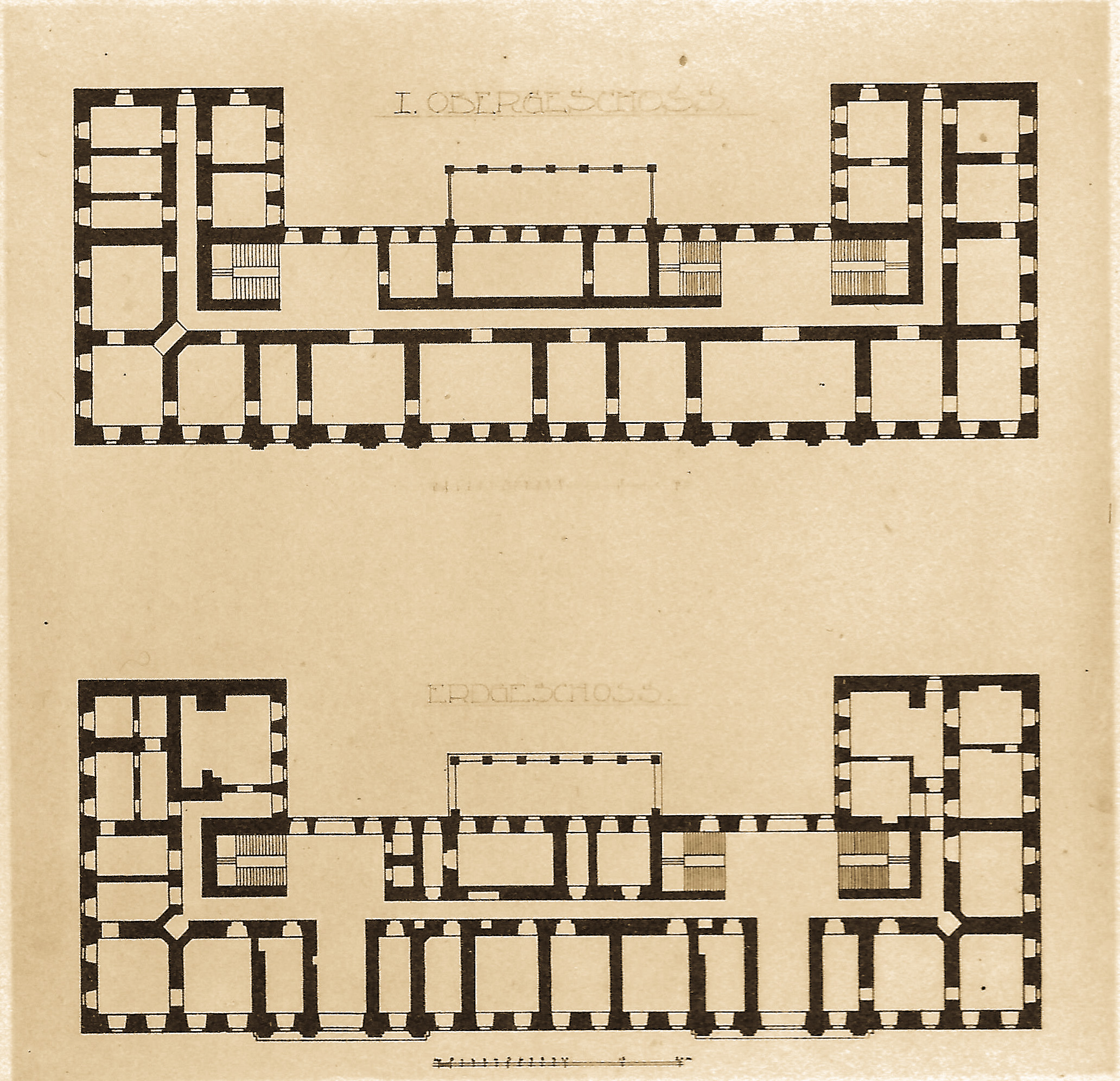 Grundrisspläne von Erdgeschoss und 1. Stock des 1784-88 erbauten Schlosses in Bad Warmbrunn von Baumeister Johann George Rudolf aus Oppeln.